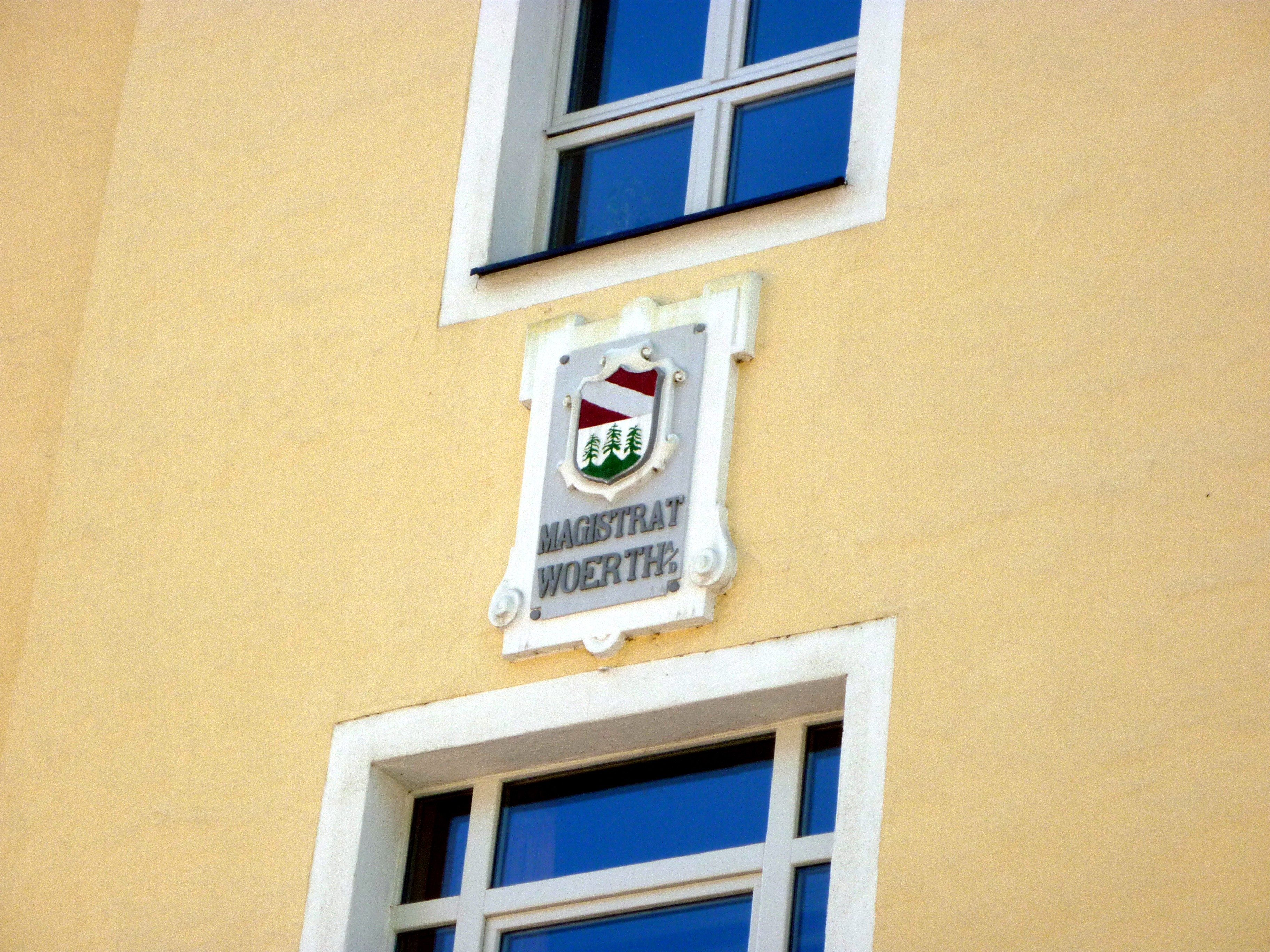 Rathaus Wörth an der Donau Wappen Magistrat